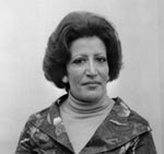 Portrait de la chanteuse tunisienne Choubeila Rached